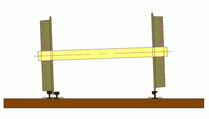 Schema Deutschlandkurve (Auflaufkurve)